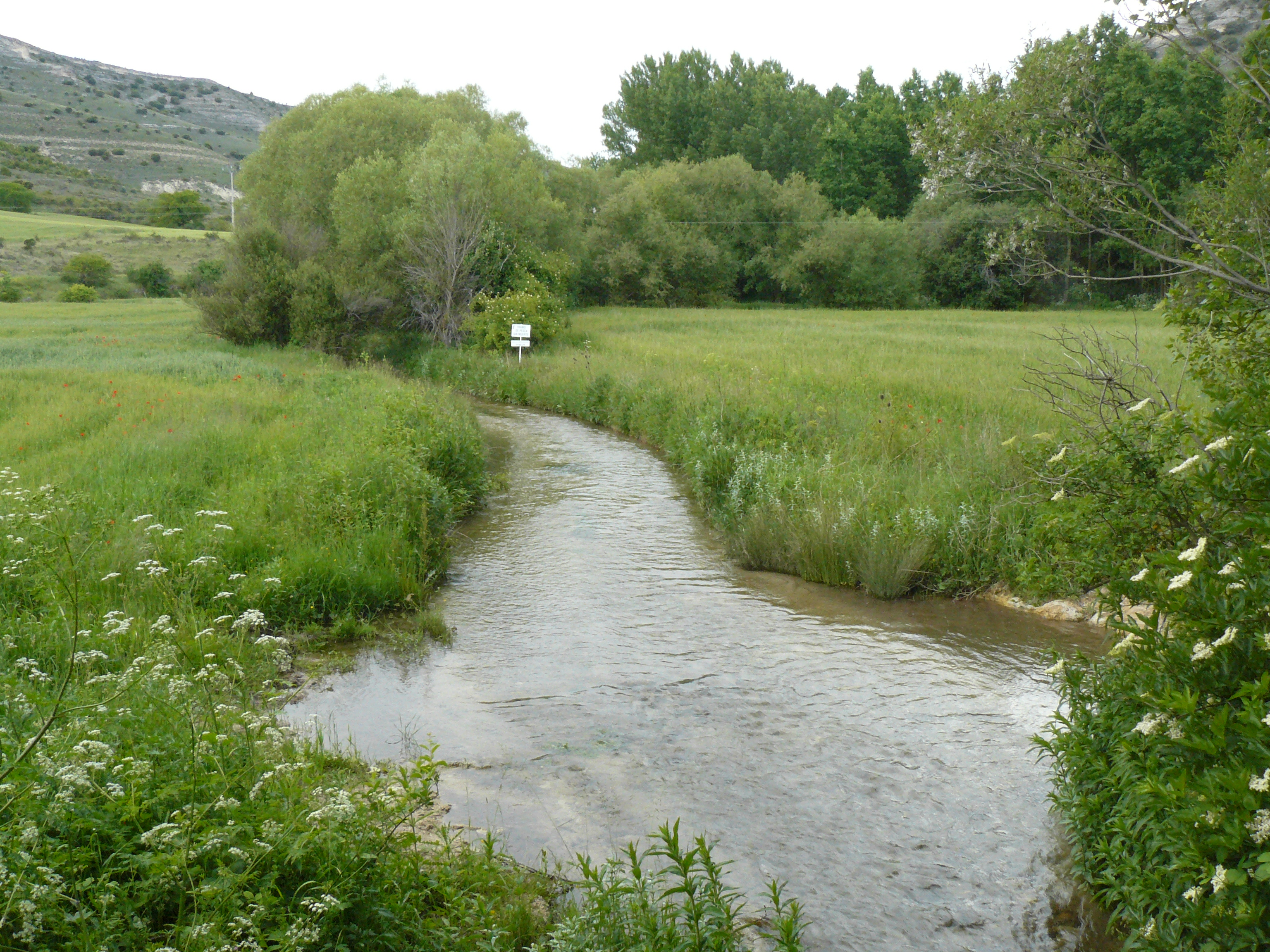 Río Bornova entre Somolinos y Albendiego, Guadalajara.